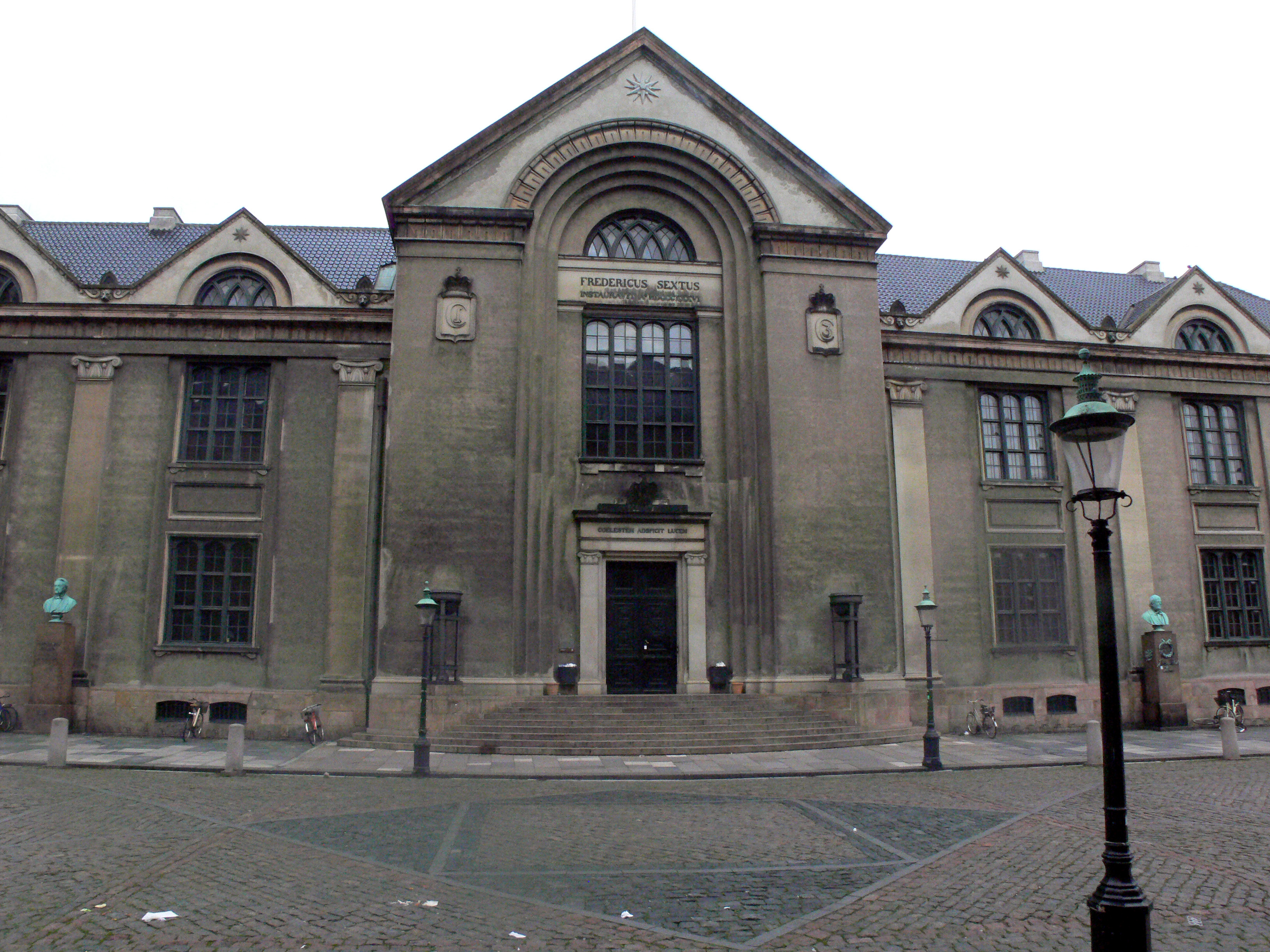 Universität von Kopenhagen.